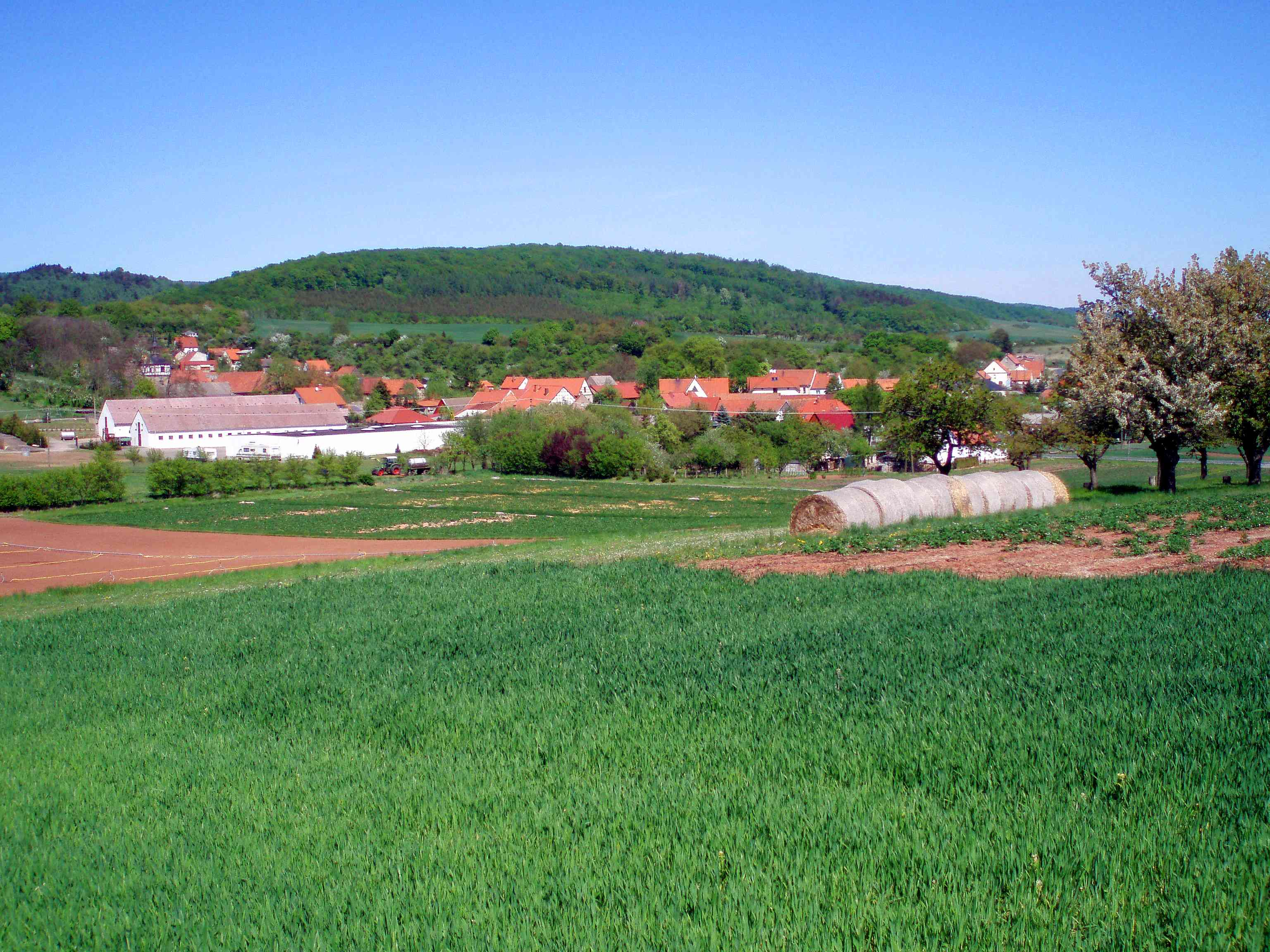 Blick auf Wickerode vom Fußweg nach Bennungen